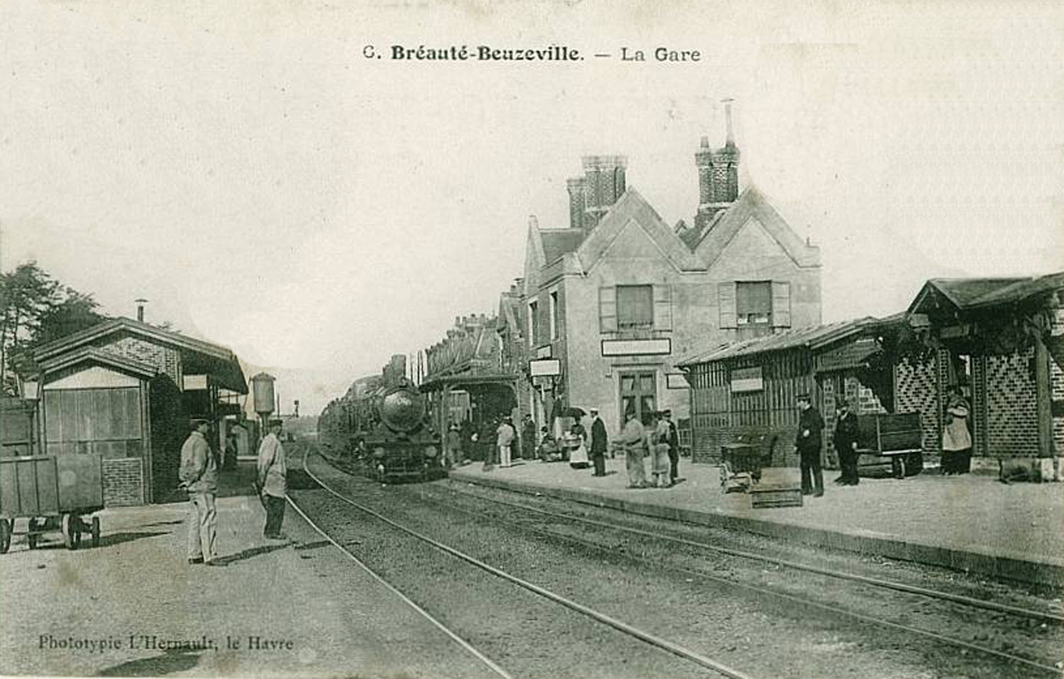 La gare de Breauté-Beuzeville sur la ligne Paris-Le Havre